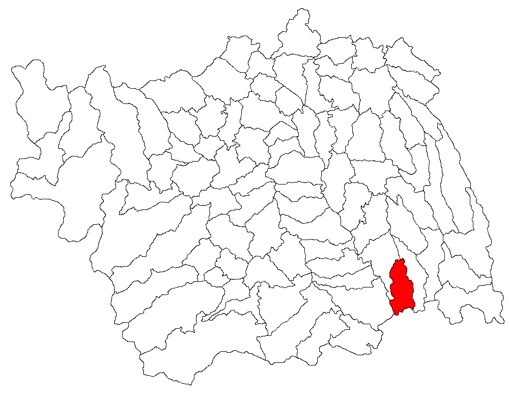 Categorie:Hărţi ale judeţului Bacău